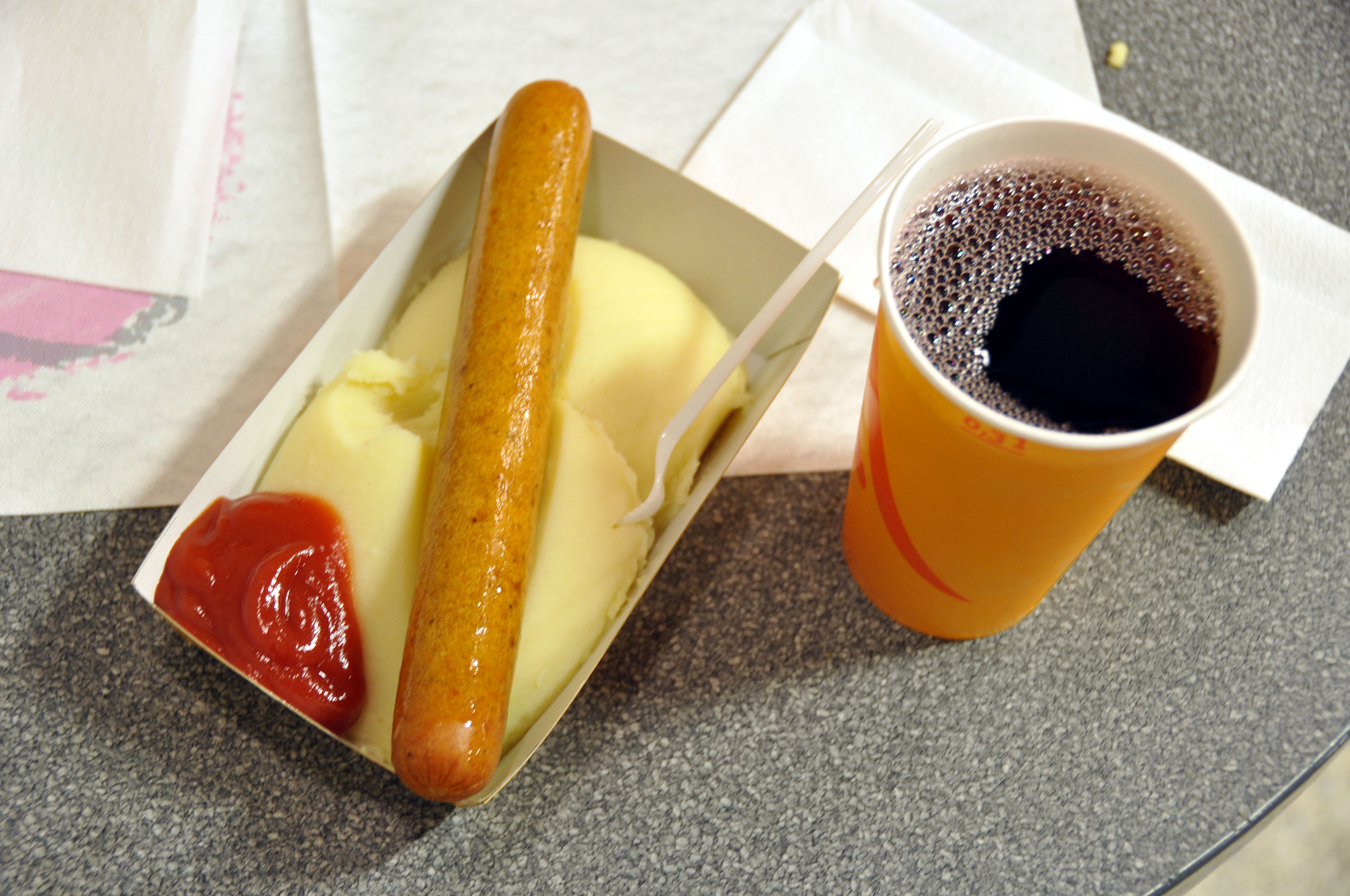 Pølse, kartoffelmos og tyttebærsaft.